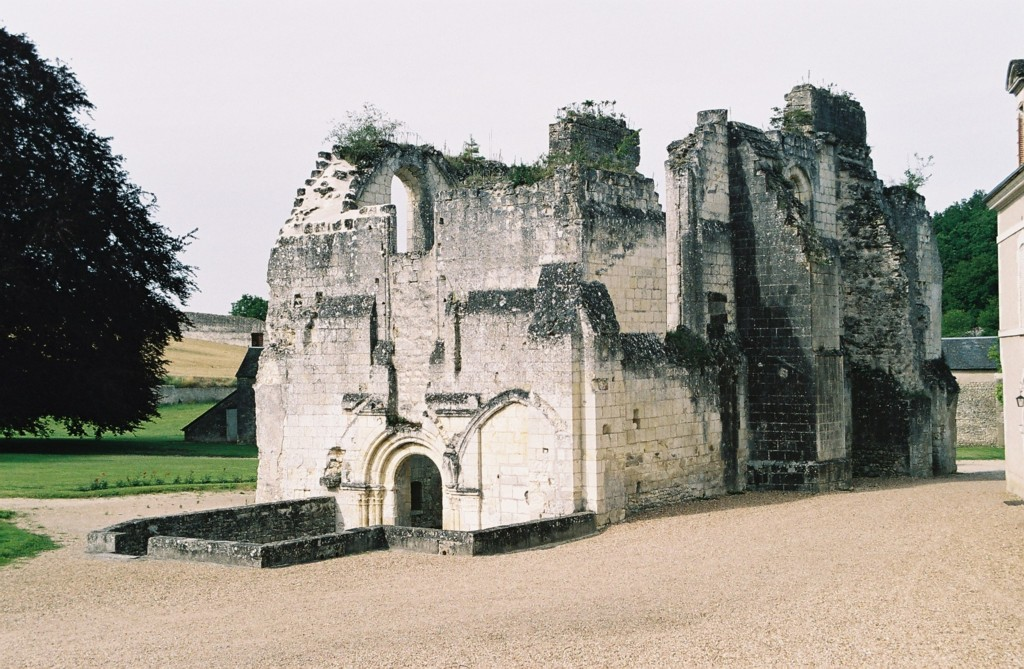 Ruines de l'église abbatiale du Liget